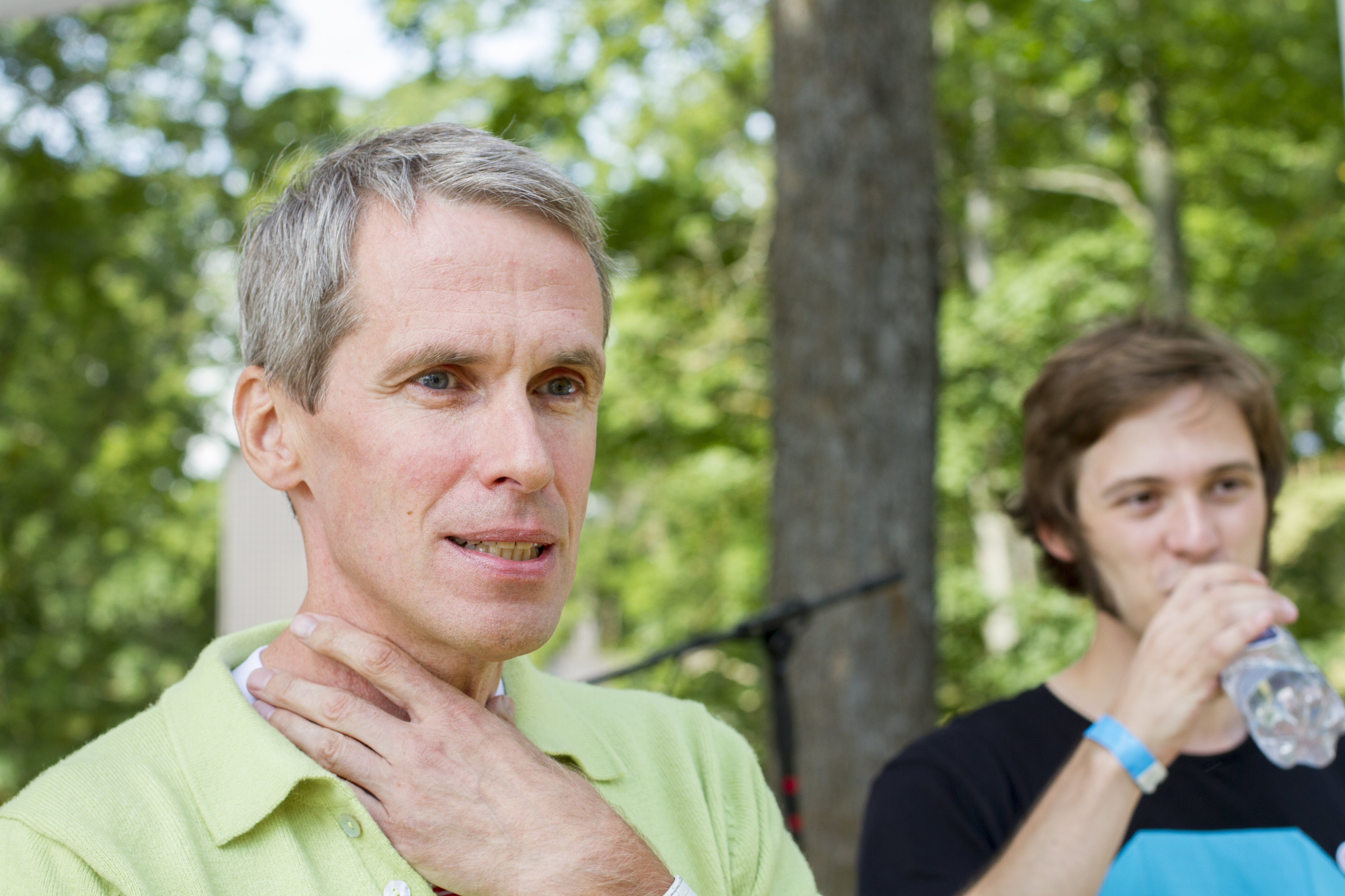 Arvamusfestival 2014